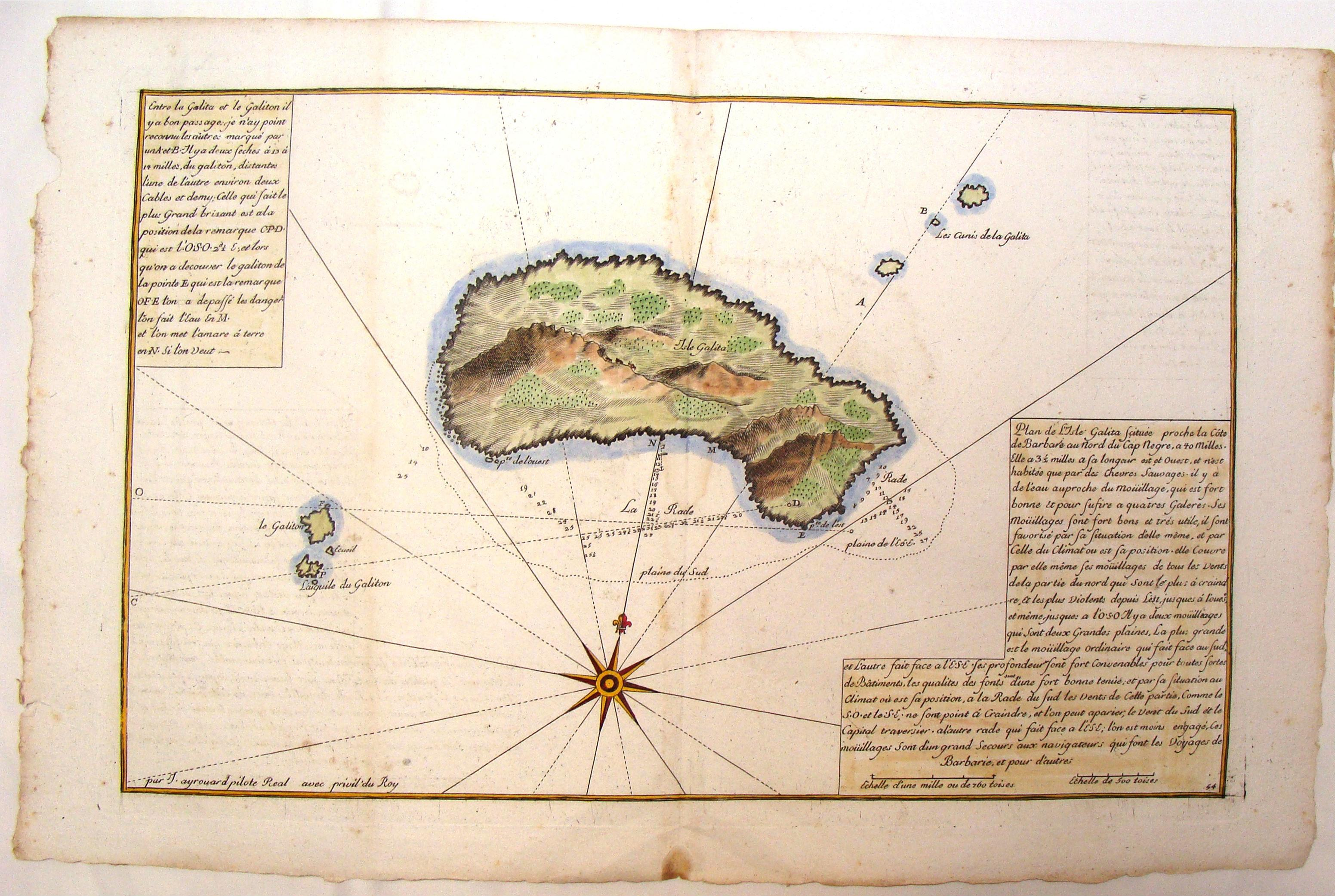 Plan de L'Isle Galita